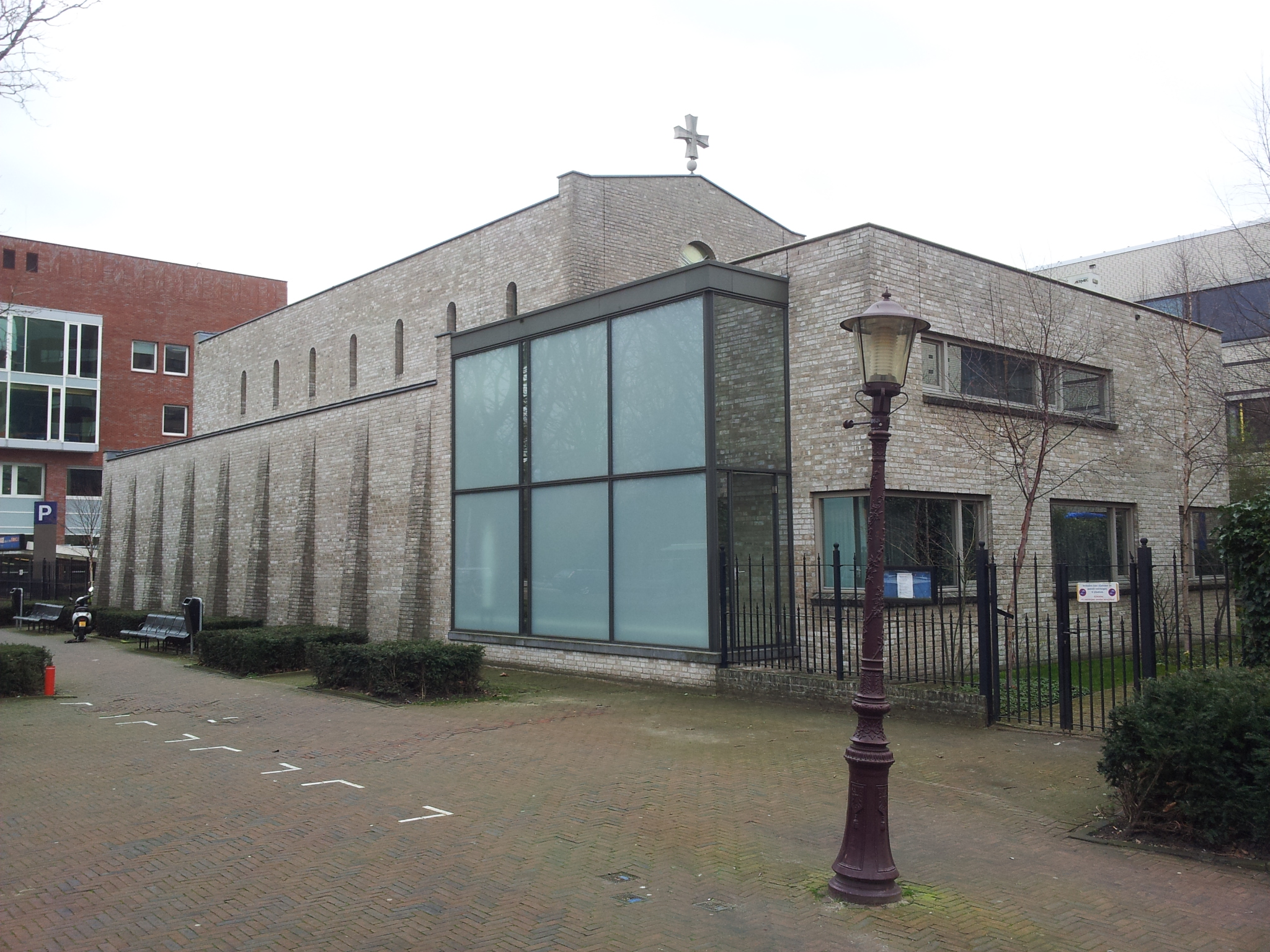 De kapel van het OLVG, aan het 's Gravesandeplein.